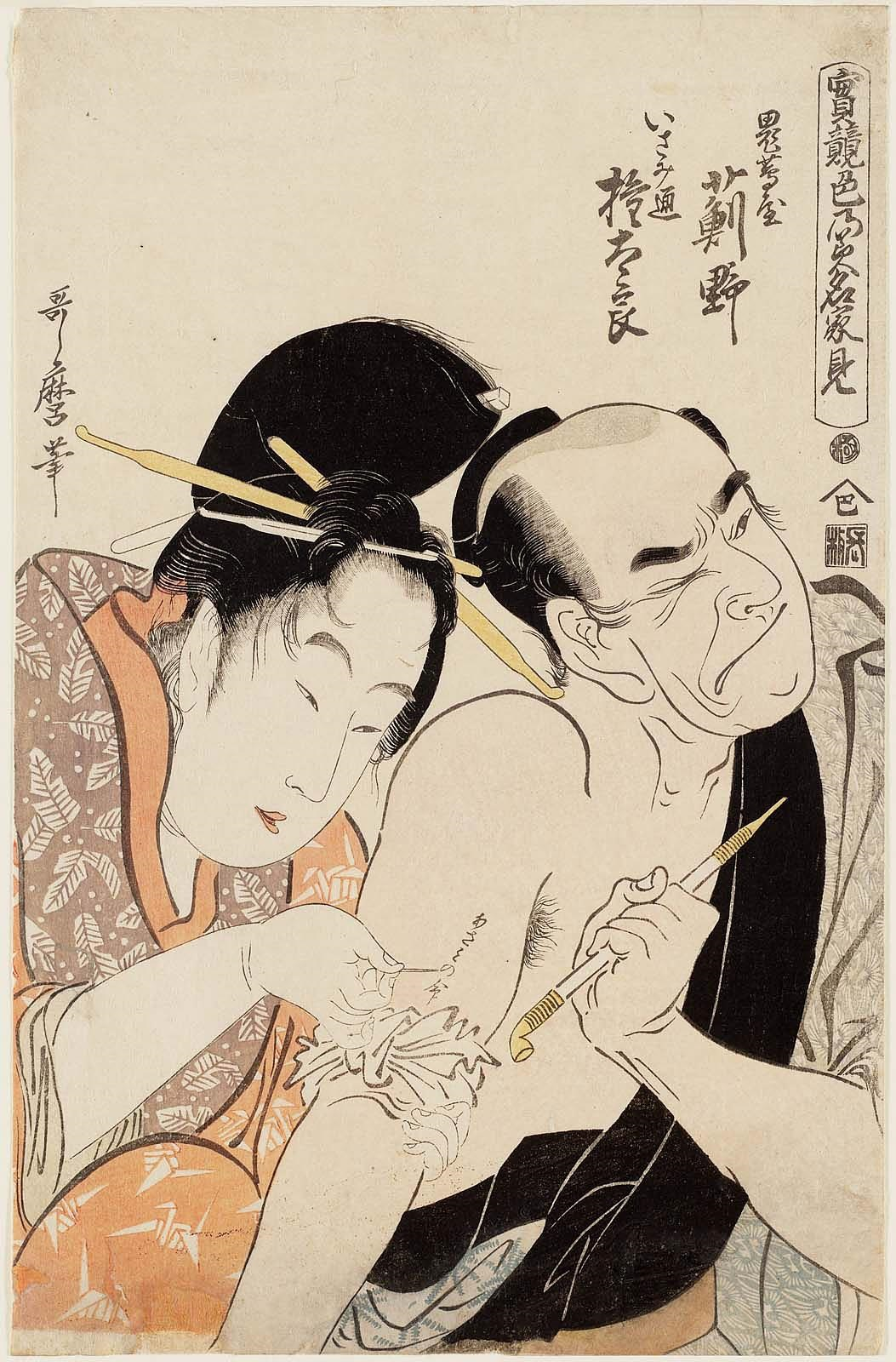 Mujer tatuando el brazo de un hombre. Estampa japonesa del periodo Edo titulada Onitsutaya Azamino y Gontaro, un hombre del mundo, de la serie "Sentimientos contradictorios: las fuentes del amor", realizada aproximadamente en el año 1798 por Kitagawa Utamaro (1750-1806) Grabado en madera; tinta y colores sobre papel.